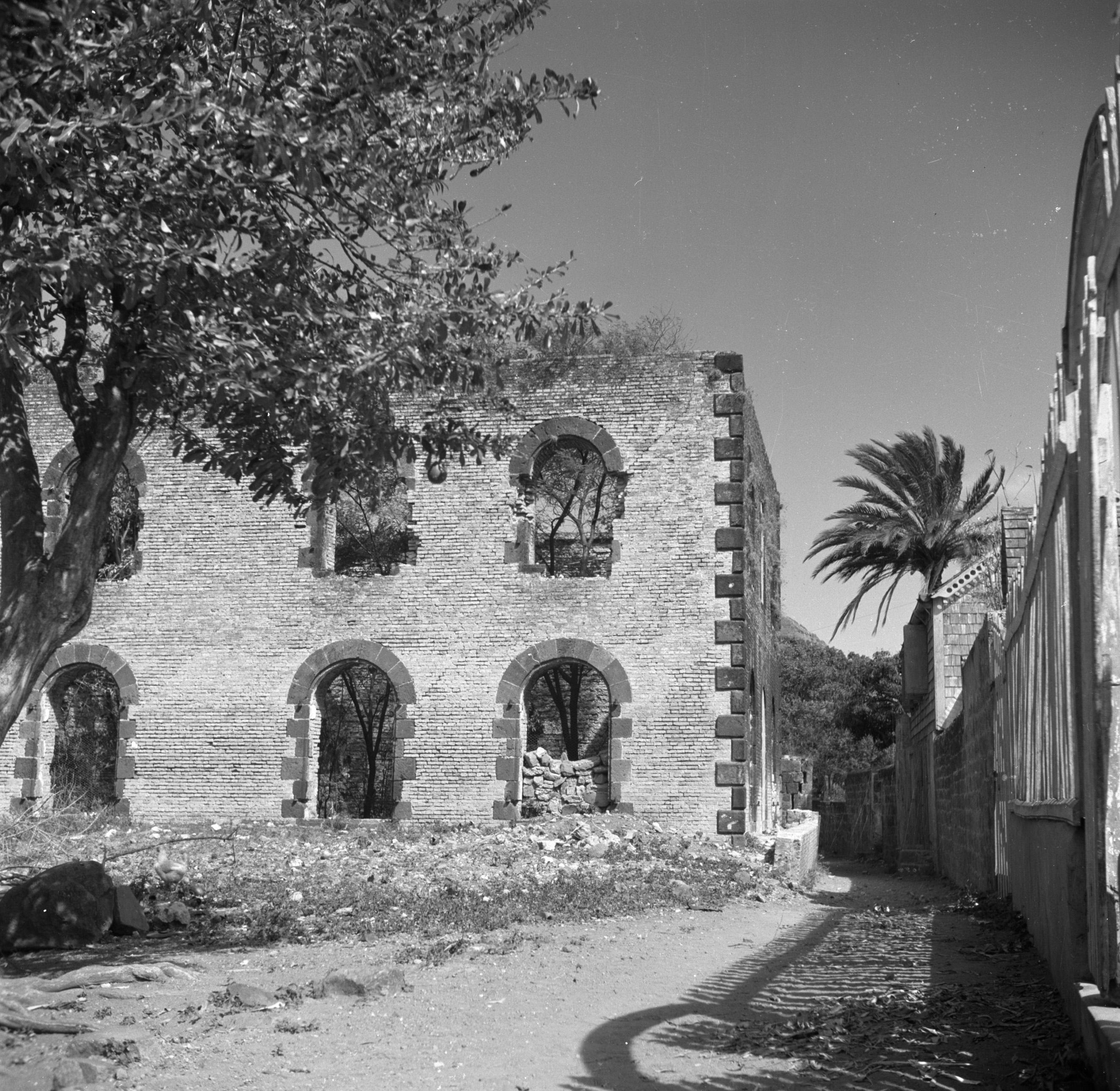 Collectie / Archief : Fotocollectie Van de Poll Reportage / Serie : Reis naar Suriname en de Nederlandse Antillen Beschrijving : De ruïne van de Honin Dalim synagoge in Oranjestad op Sint-Eustatius Datum : 1947 Locatie : Nederlandse Antillen, Oranjestad, Sint-Eustatius Trefwoorden : ruïnes, synagogen Fotograaf : Poll, Willem van de, [onbekend] Auteursrechthebbende : Nationaal Archief Materiaalsoort : Negatief (zwart/wit) Nummer archiefinventaris : bekijk toegang 2.24.14.02 Bestanddeelnummer : 252-8299